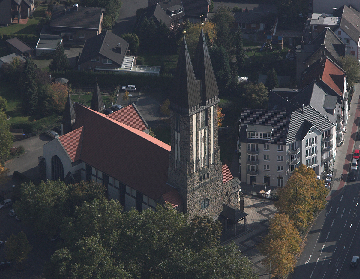 Luftbildaufnahme Hamm